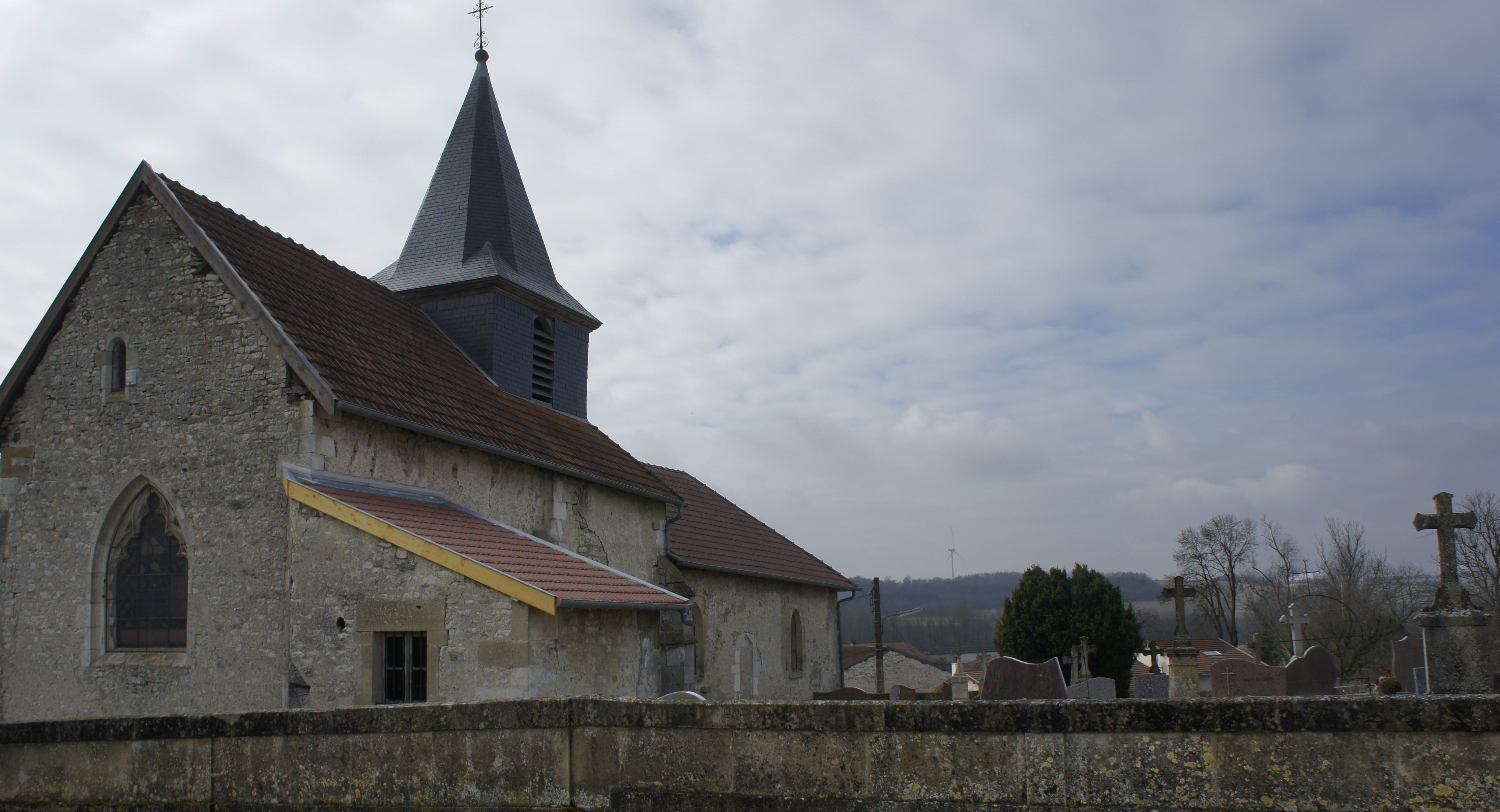 Chevet et flanc nord de l'église Sainte-Agathe de Courcelles-sur-Aire (55).